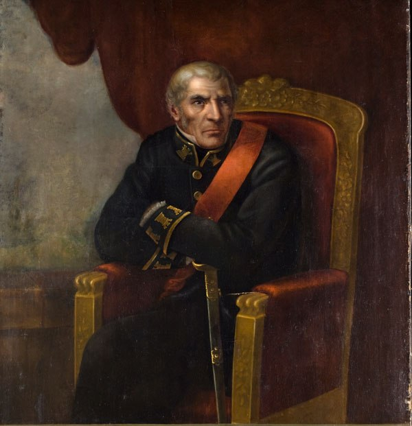 “Retrato del Gobernador Antonio García Carrasco”